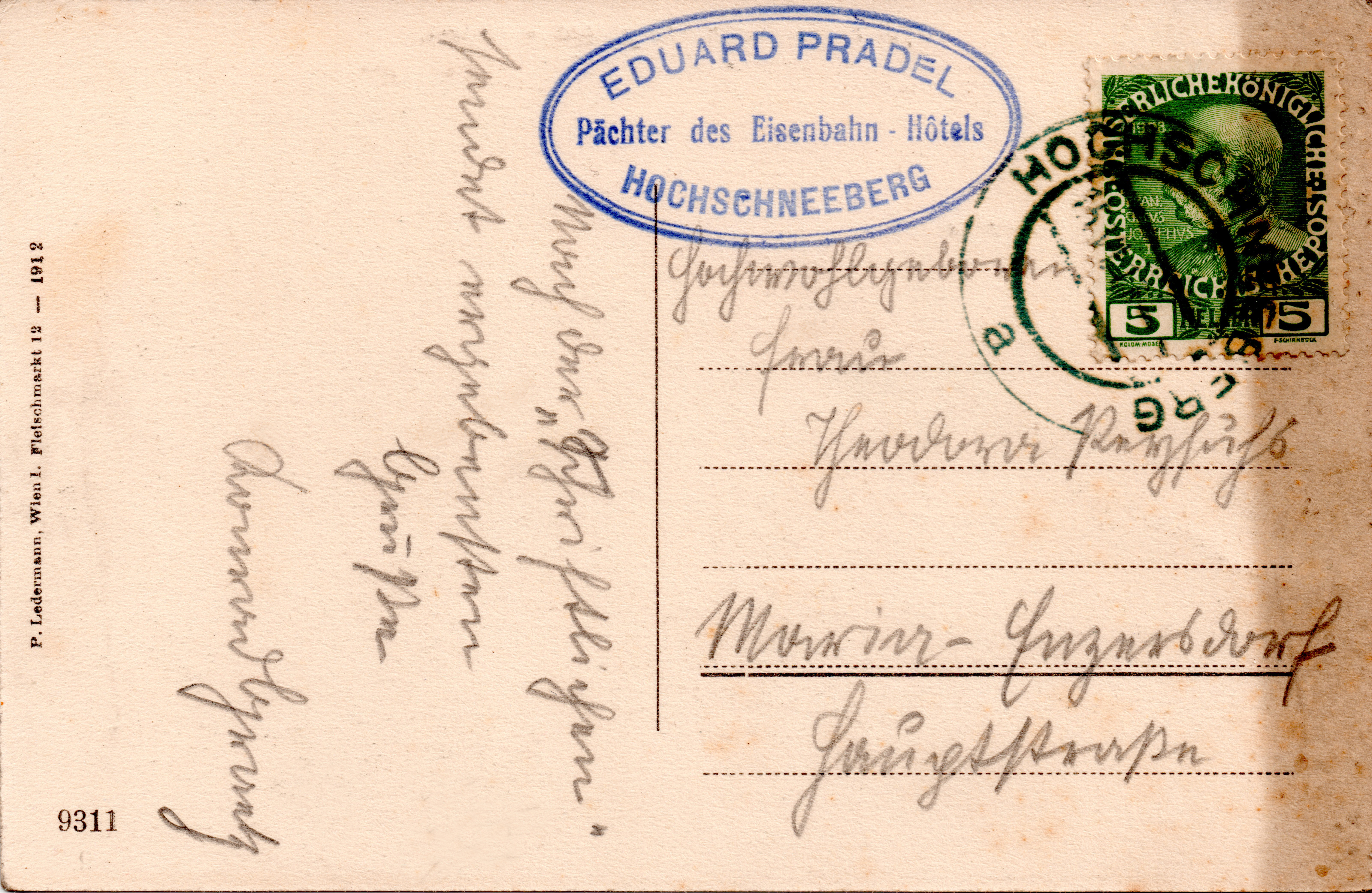 Diese Rückseite einer Ansichtskarte des Berghotels Hochschneeberg dokumentiert die Poststelle in diesem Hotel. Karte und Briefmarke wurden 1912 herausgegeben, die Entwertung stammt daher aus 1912 oder seinen Folgejahren.